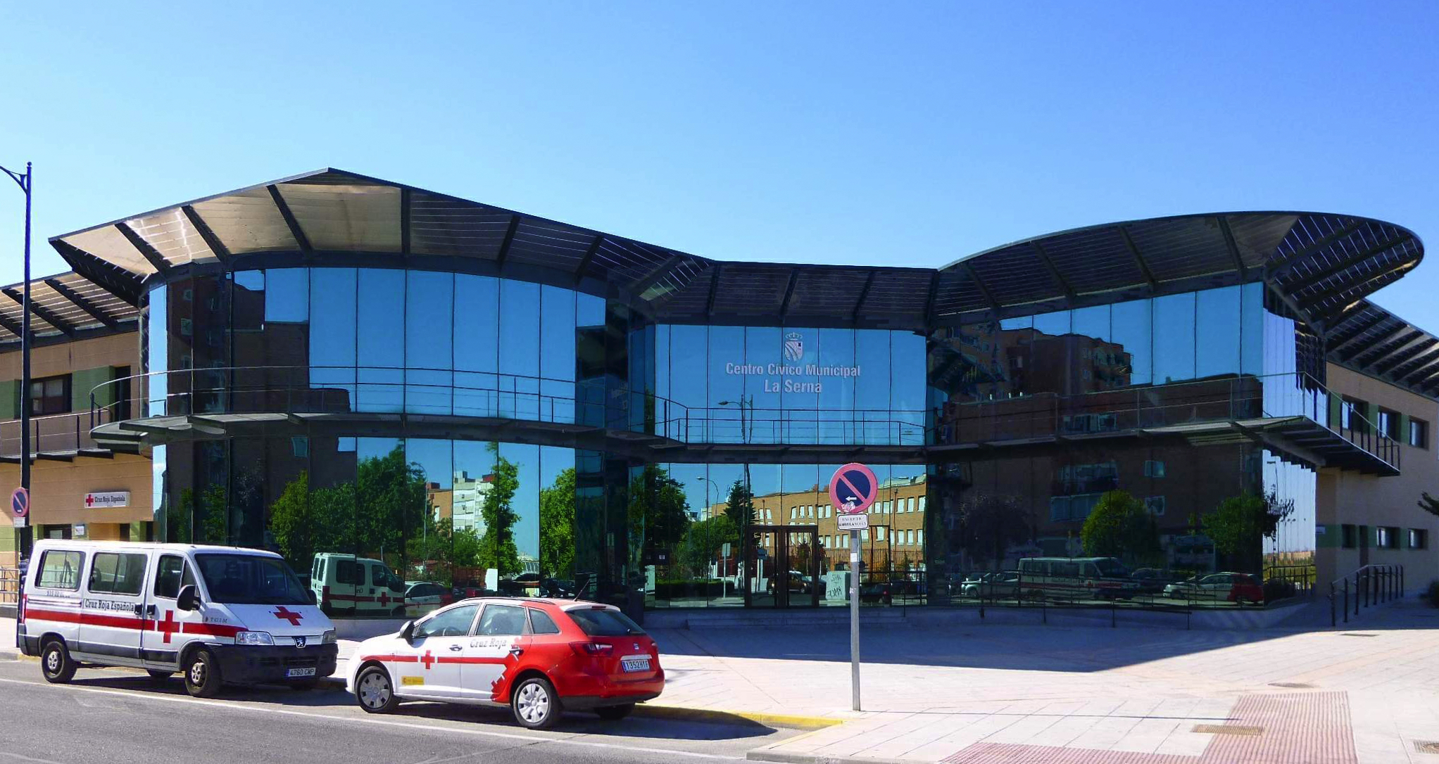 Centro Civico Municipal La Serna (Fuenlabrada, Madrid)